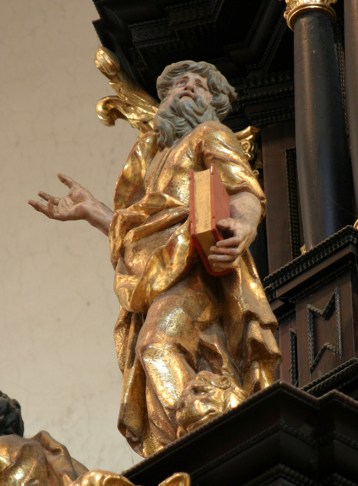 Kazatelna Konice